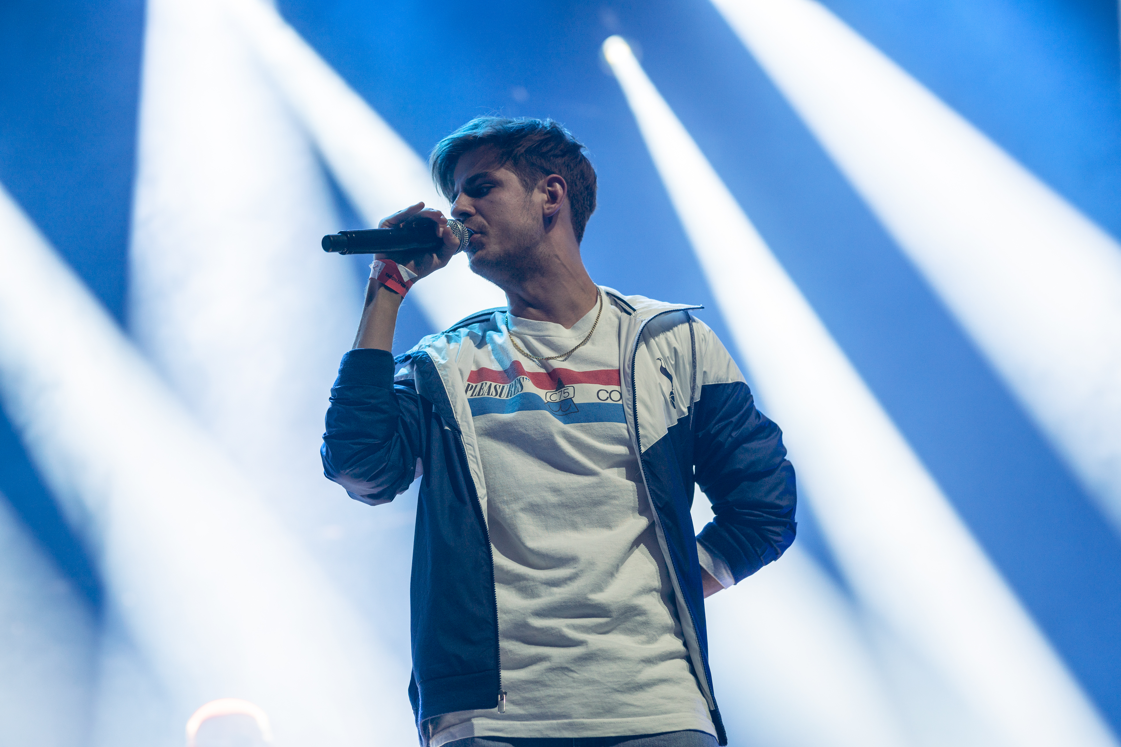 Taconafide podczas koncertu w Warszawie w ramach trasy Ekodiesel Tour promującej debiutancki album Soma 0,5 mg.